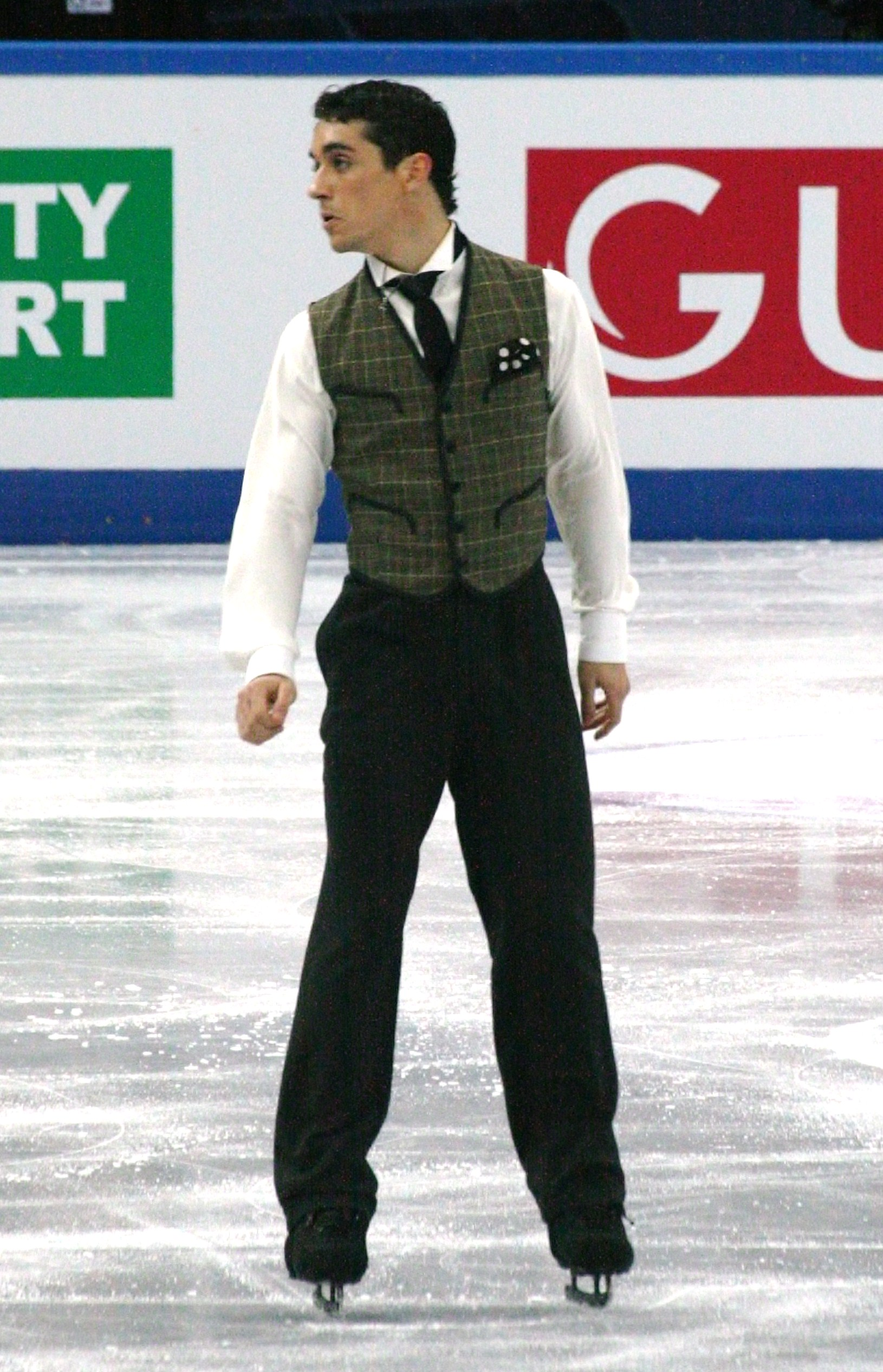 Хавьер Фернандес (Испания) на финале Гран-при 2012-2013. Произвольная программа.